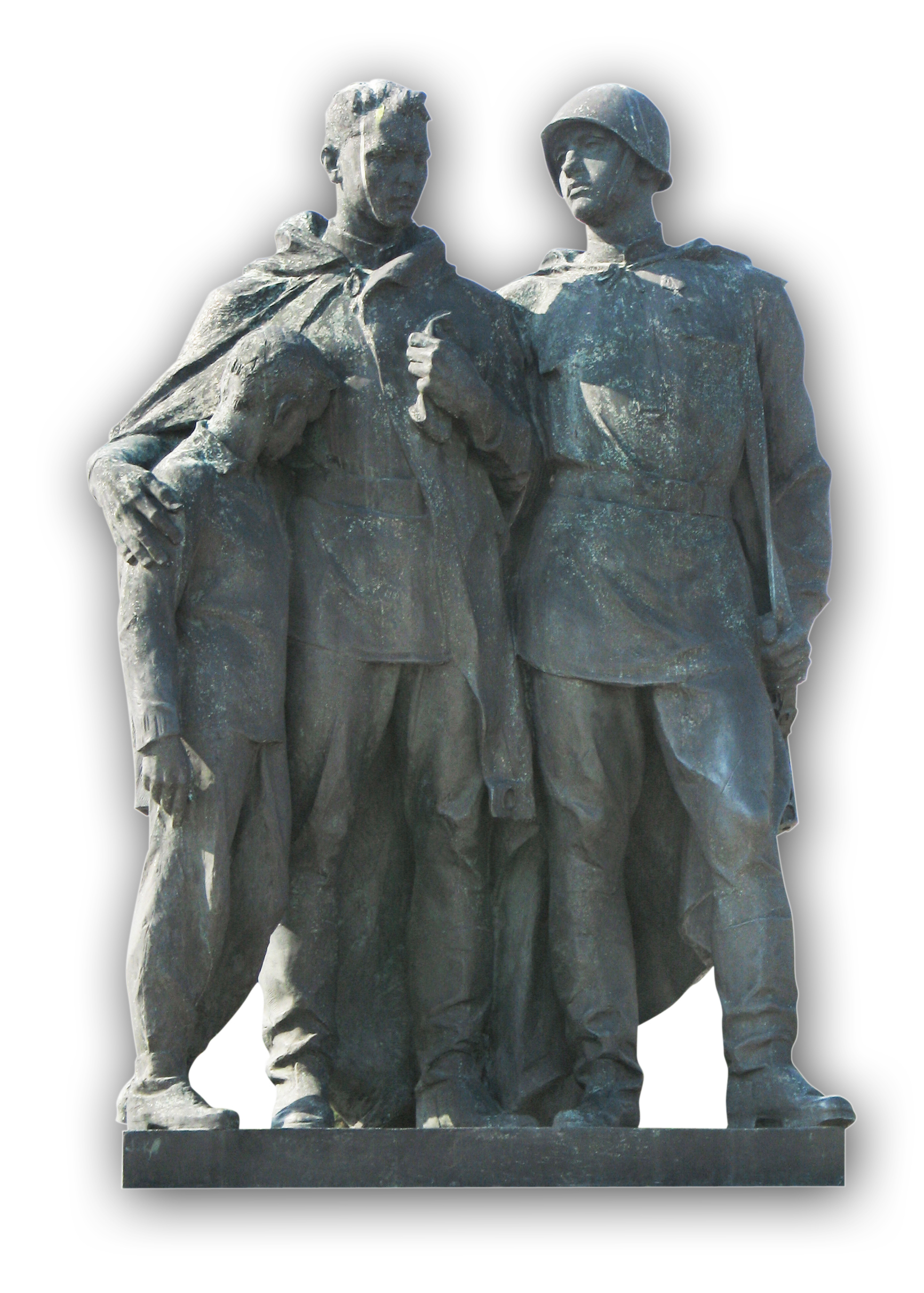 Bronzová plastika na bratislavskom Slavíne "Nad hrobom spolubojovníka" zobrazuje vojakov 2. svetovej vojny, ktorí sa podieľali na oslobodzovaní Slovenska